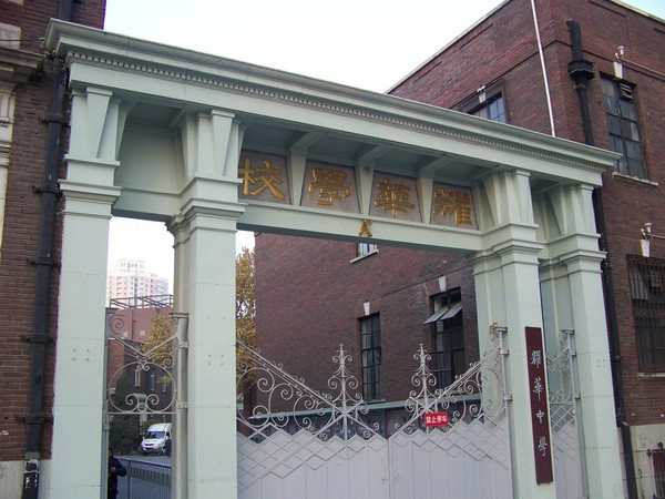 耀华学校老校门